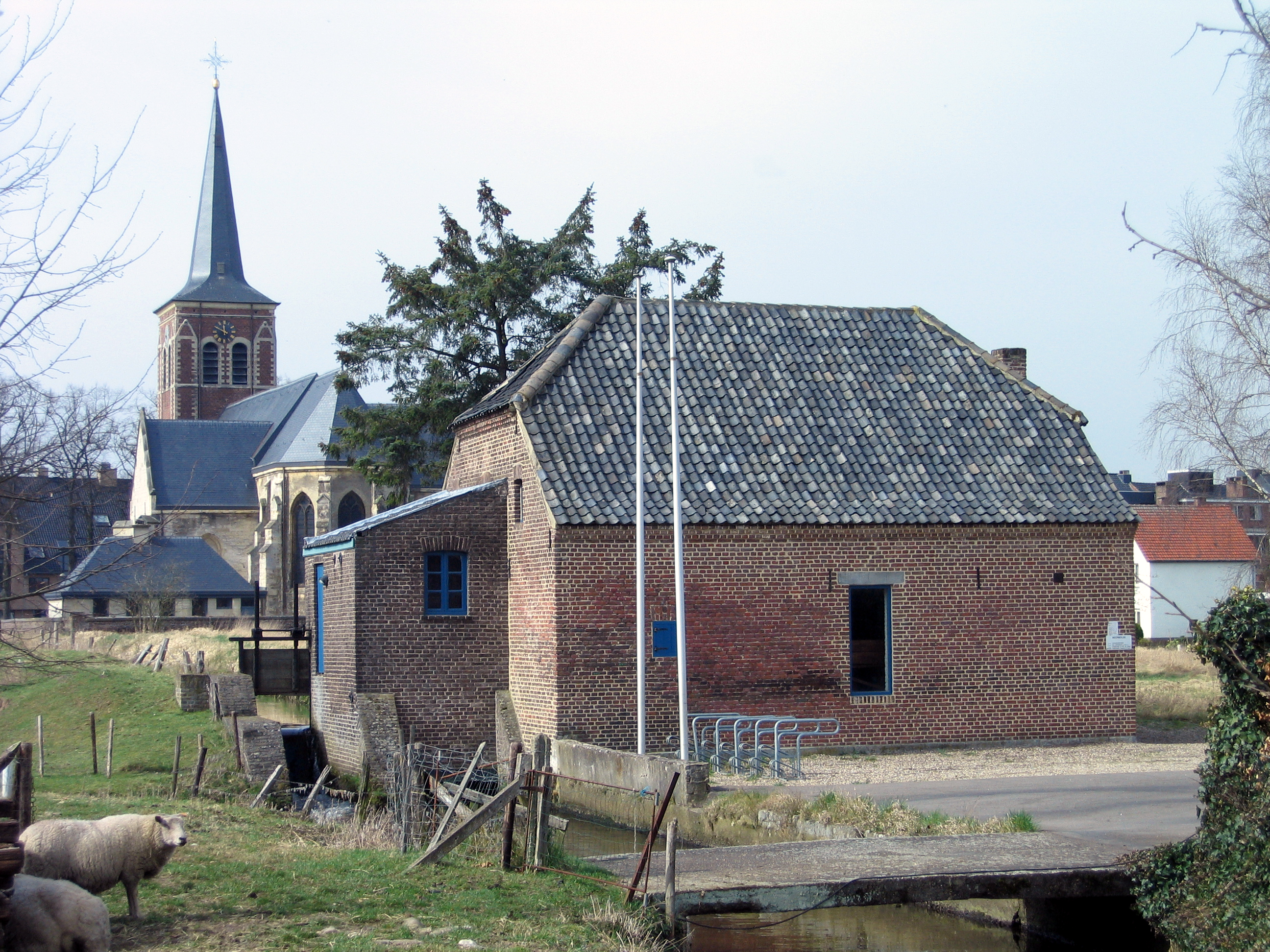 Neermolen, watermolen op de Bosbeek in Neeroeteren (Maaseik, België)